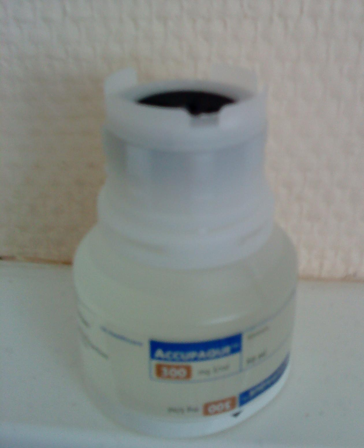 Flacon de produit de contraste iodé destiné à l'injection intra-artérielle et intraveineuse